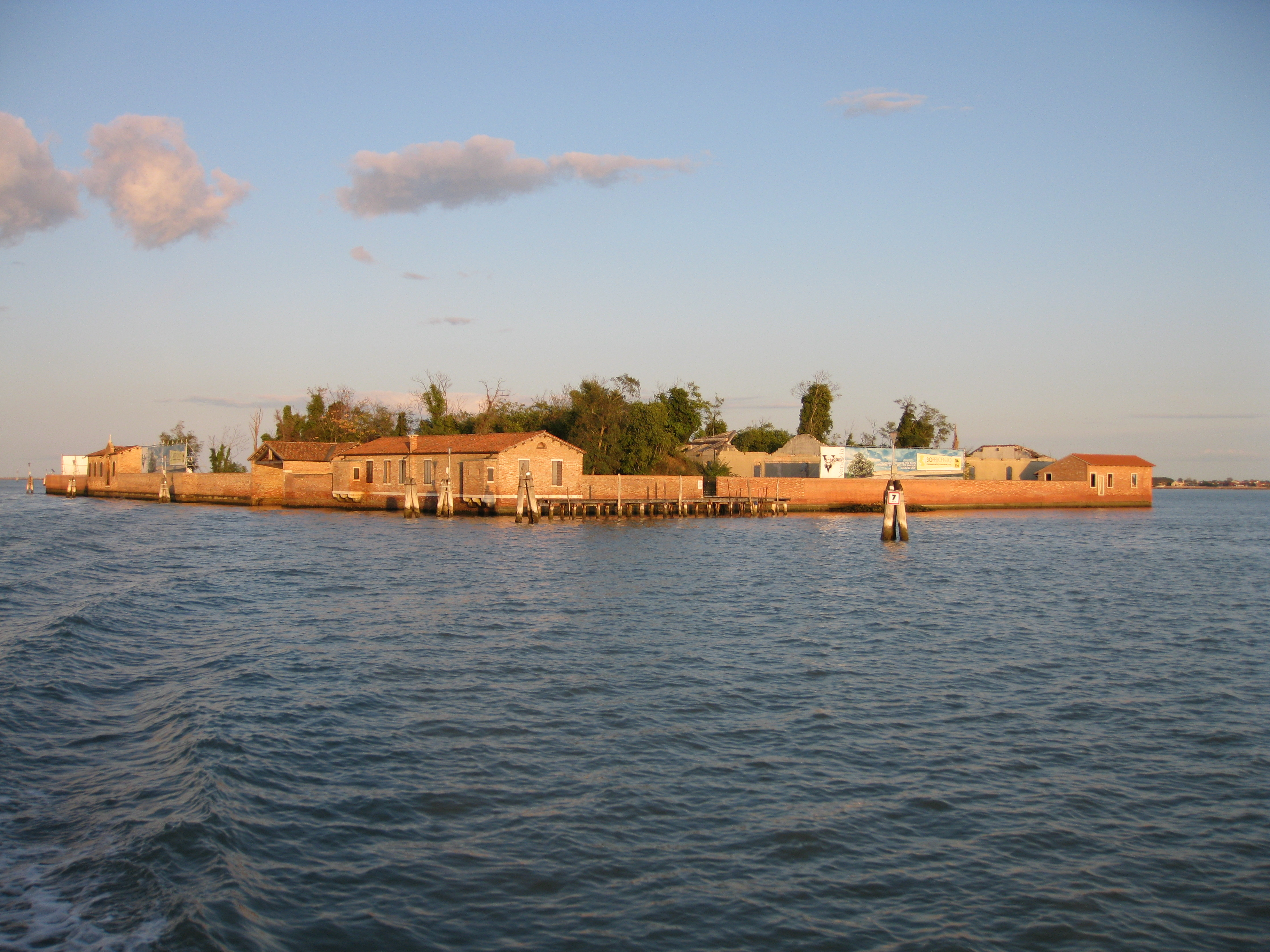 Isola di San Giacomo in Paludo